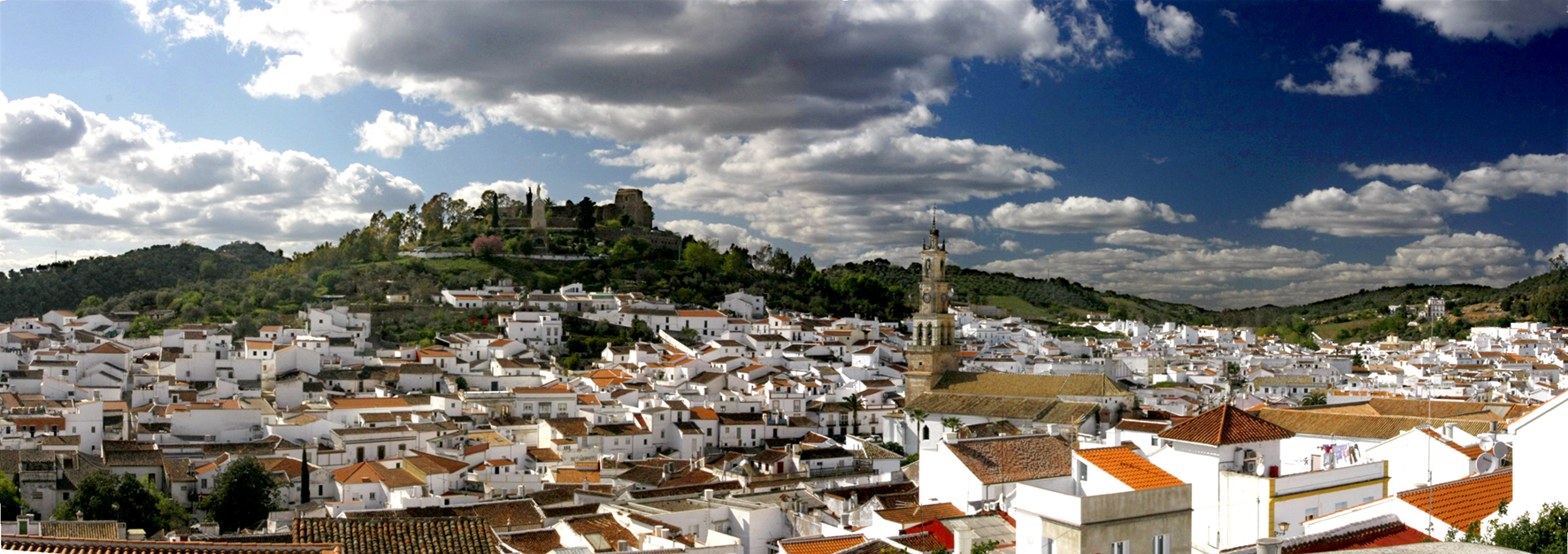 vista general de constantina